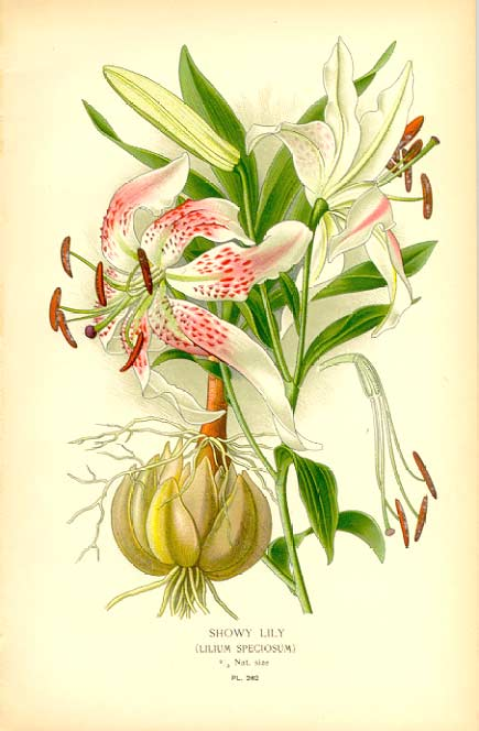 Lilium Speciosum, Chromolithographie 1896, Künstler: Edward Step & William Watson